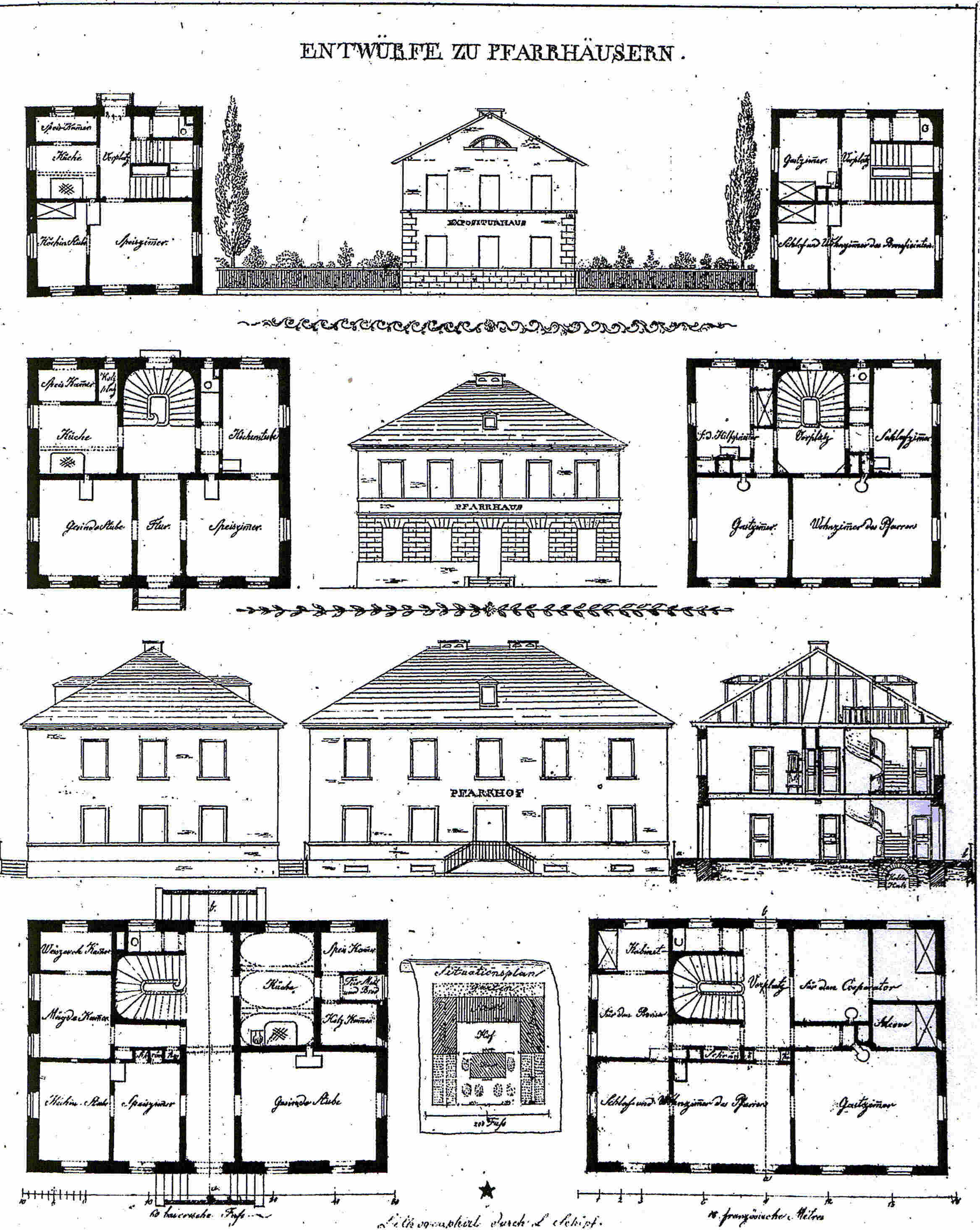 Musterblatt für Pfarrhaeuser aus dem Monatsblatt für Bauwesen und Landesverschönerung, München, November 1821